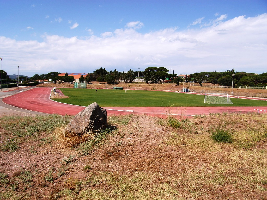 Stade Gallieni de Fréjus (83)